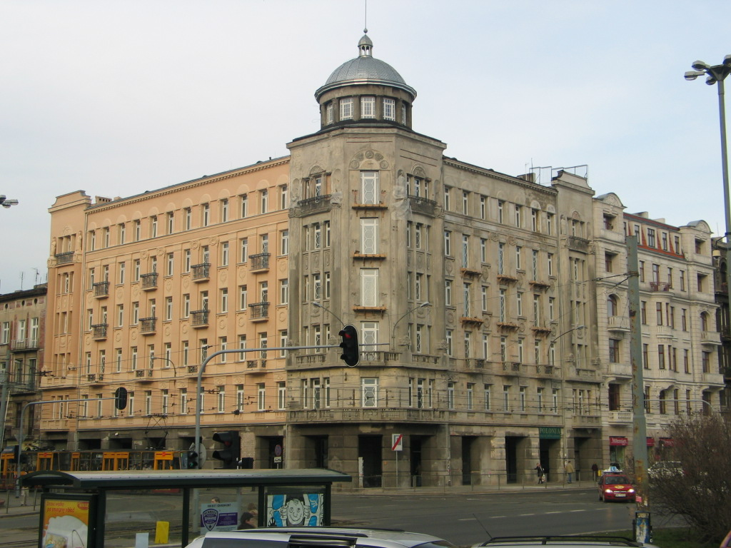 Hotel Polonia Palast w Łodzi